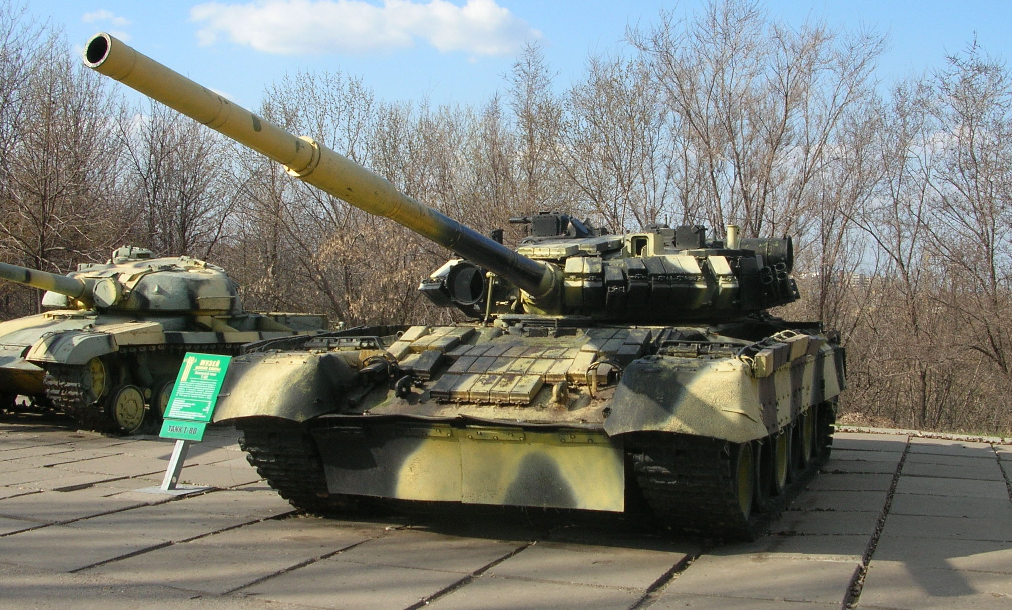 Танк Т-80. Парк Победы, г. Саратов.